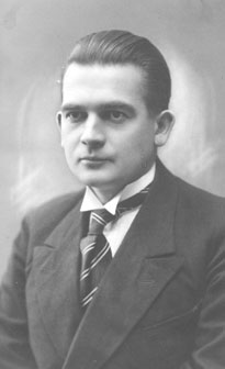 Gerhard Rooks, eesti arstiteadlane